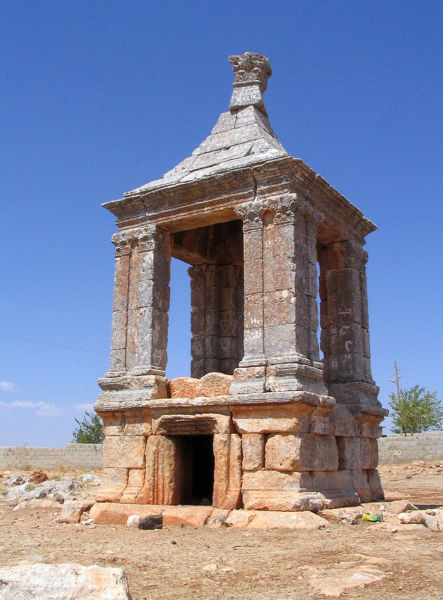 Römisches Monumentalgrab in Hisar bei Gaziantep, Türkei